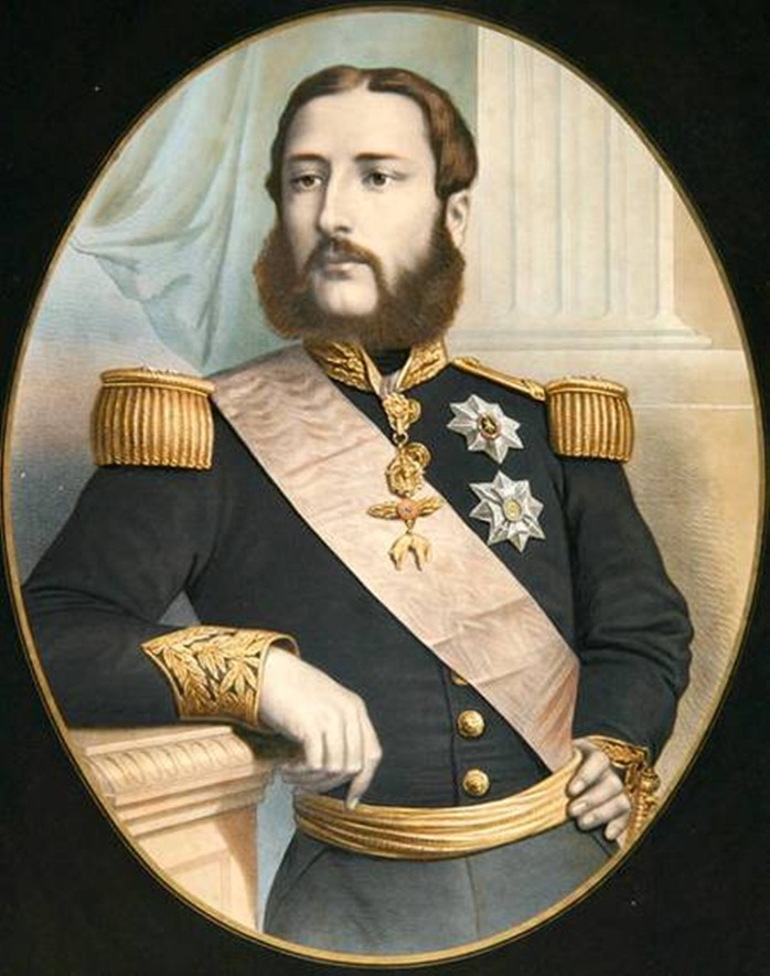 Le roi Léopold II de Belgique vers 1866.